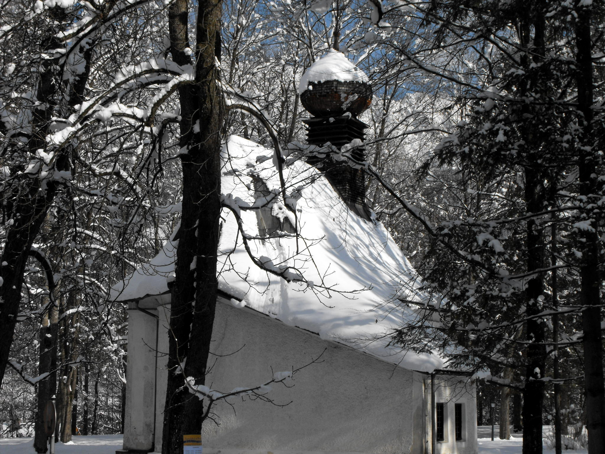 Hubertuskapelle in Schönau am Königssee im WinterThis is a photograph of an architectural monument.